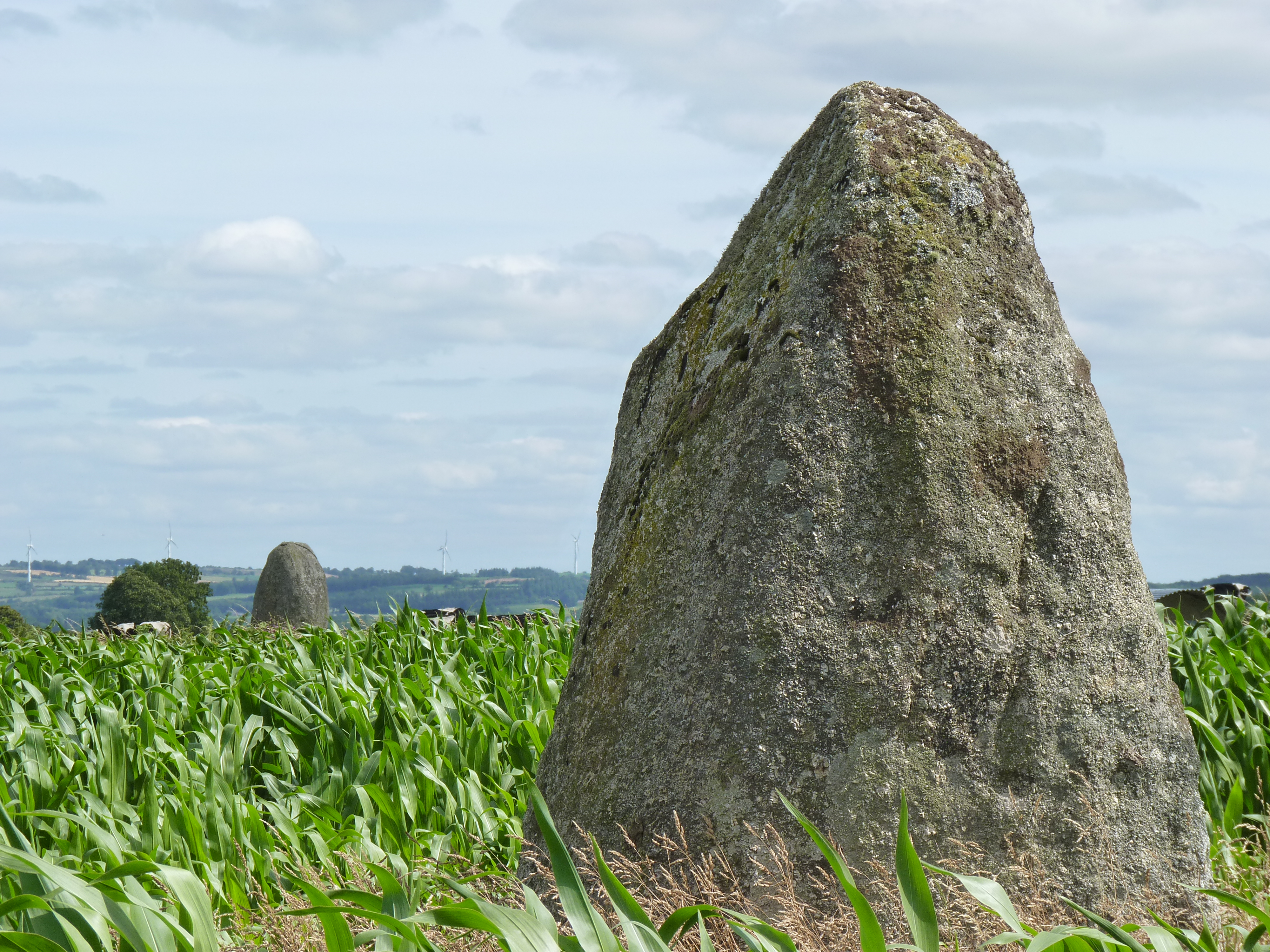 Avec le menhir de Botudo en arrière-plan